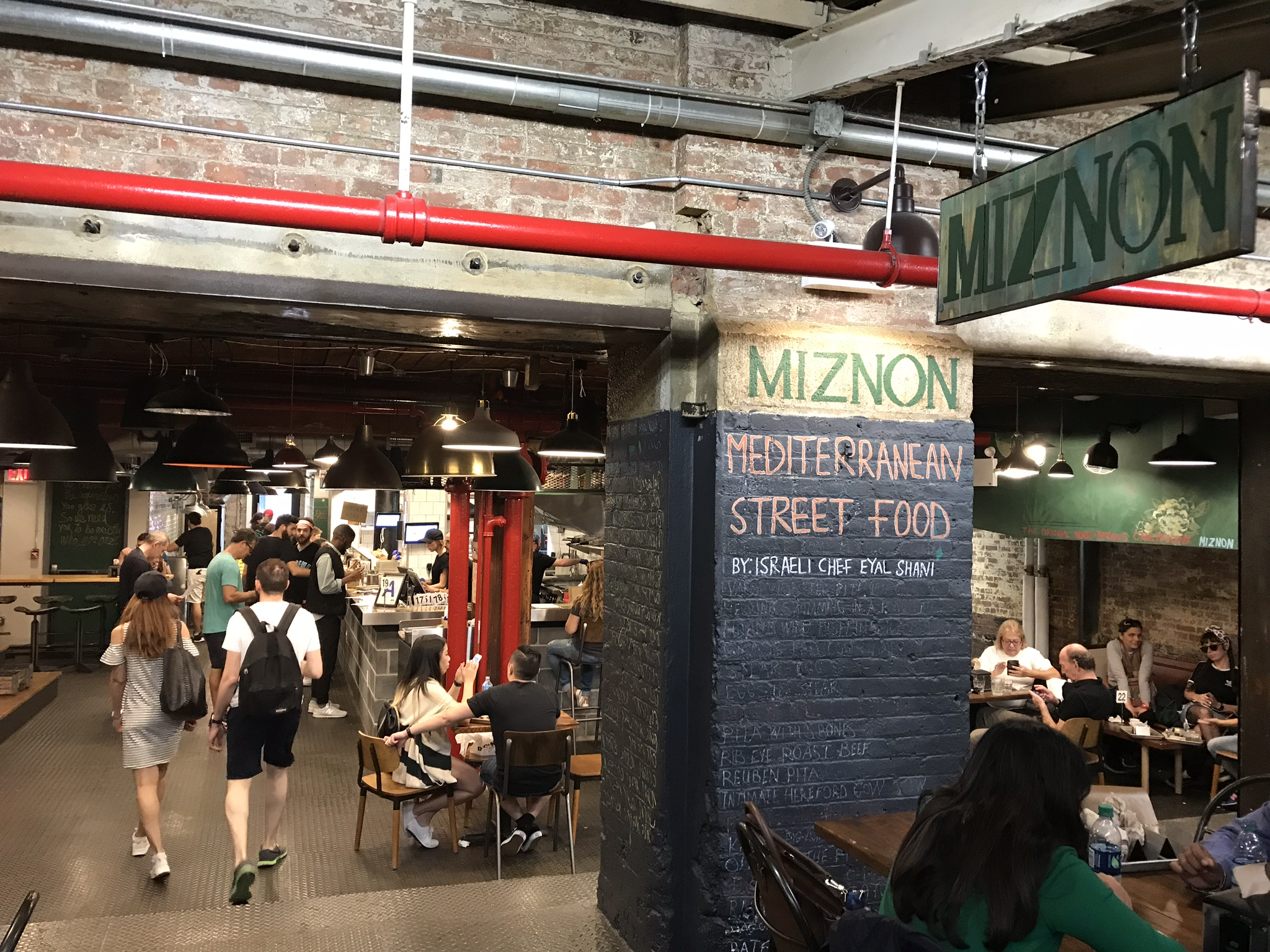 Miznon restaurant NYC